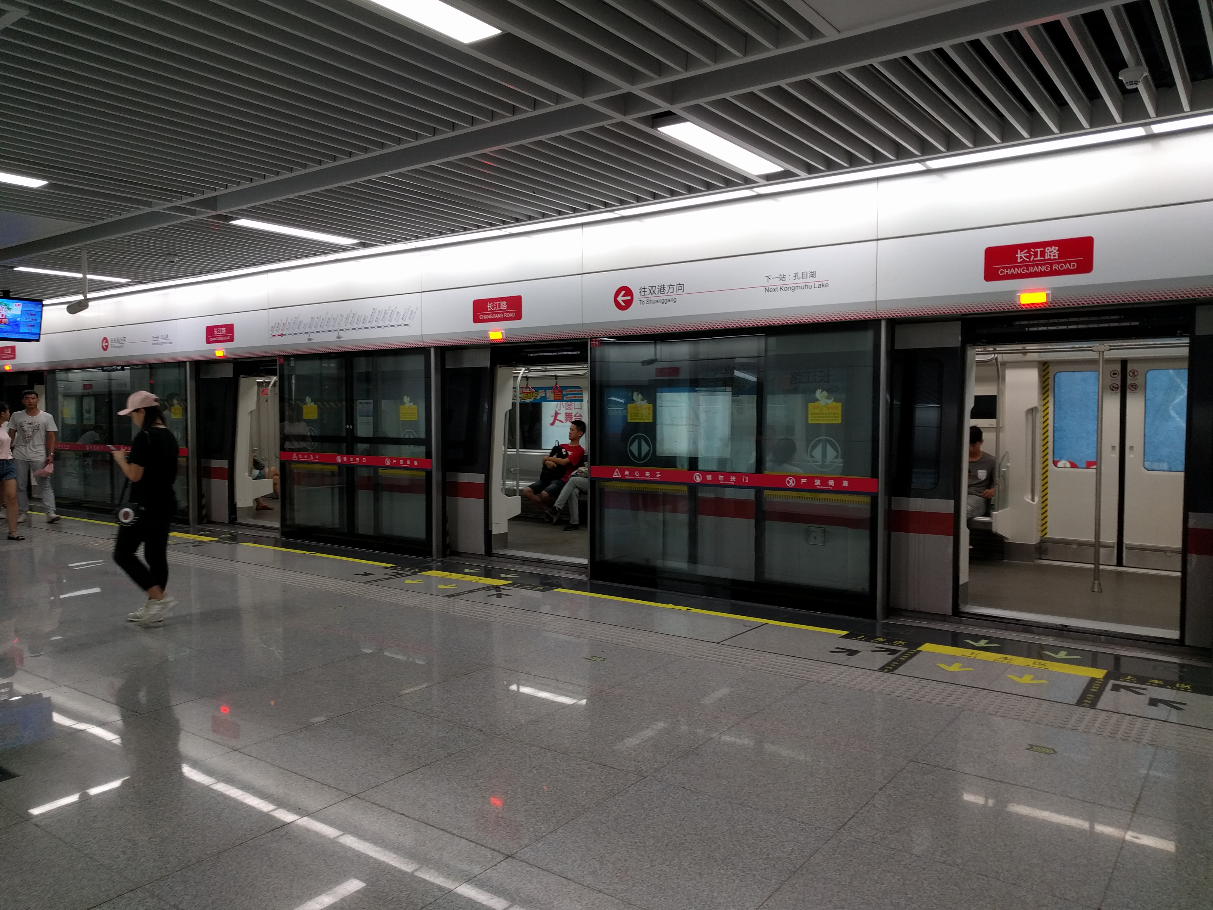 长江路站站台